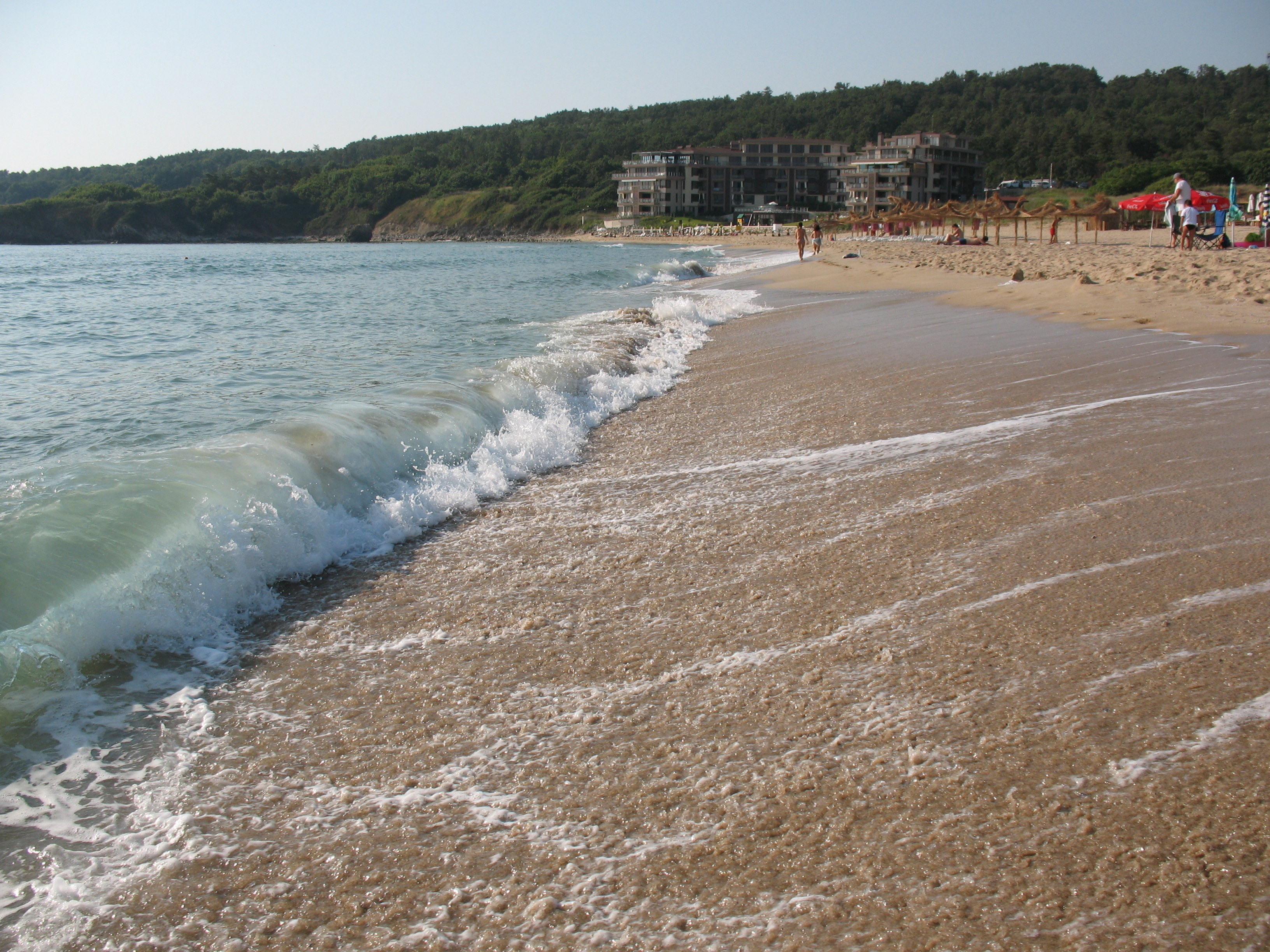 Плаж залив Каваците